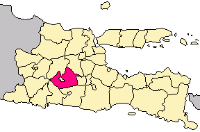 carte indonésienne